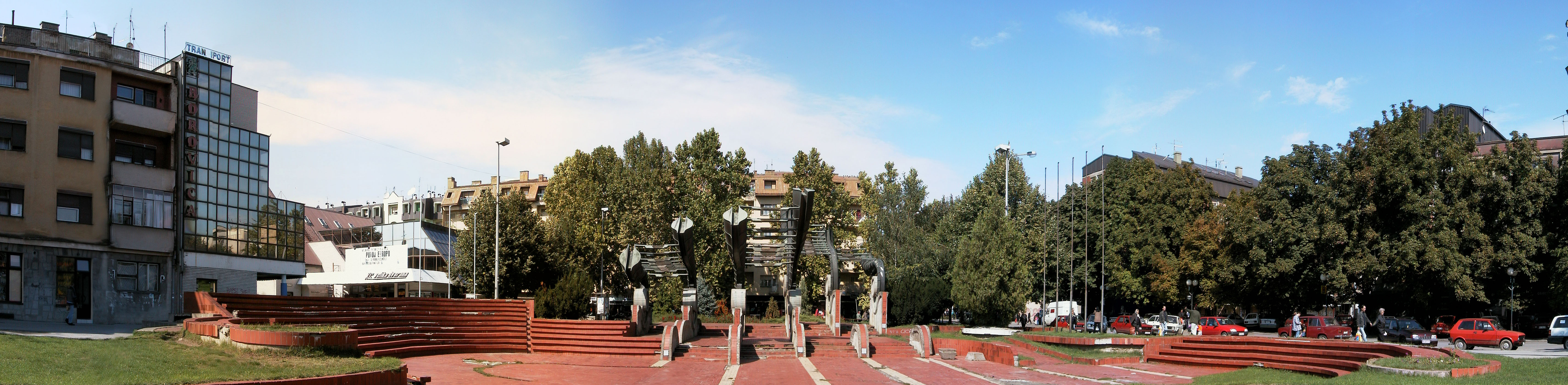 Panoramska fotografija gradskog trga u Rumi. Autor Dragan Maričić.